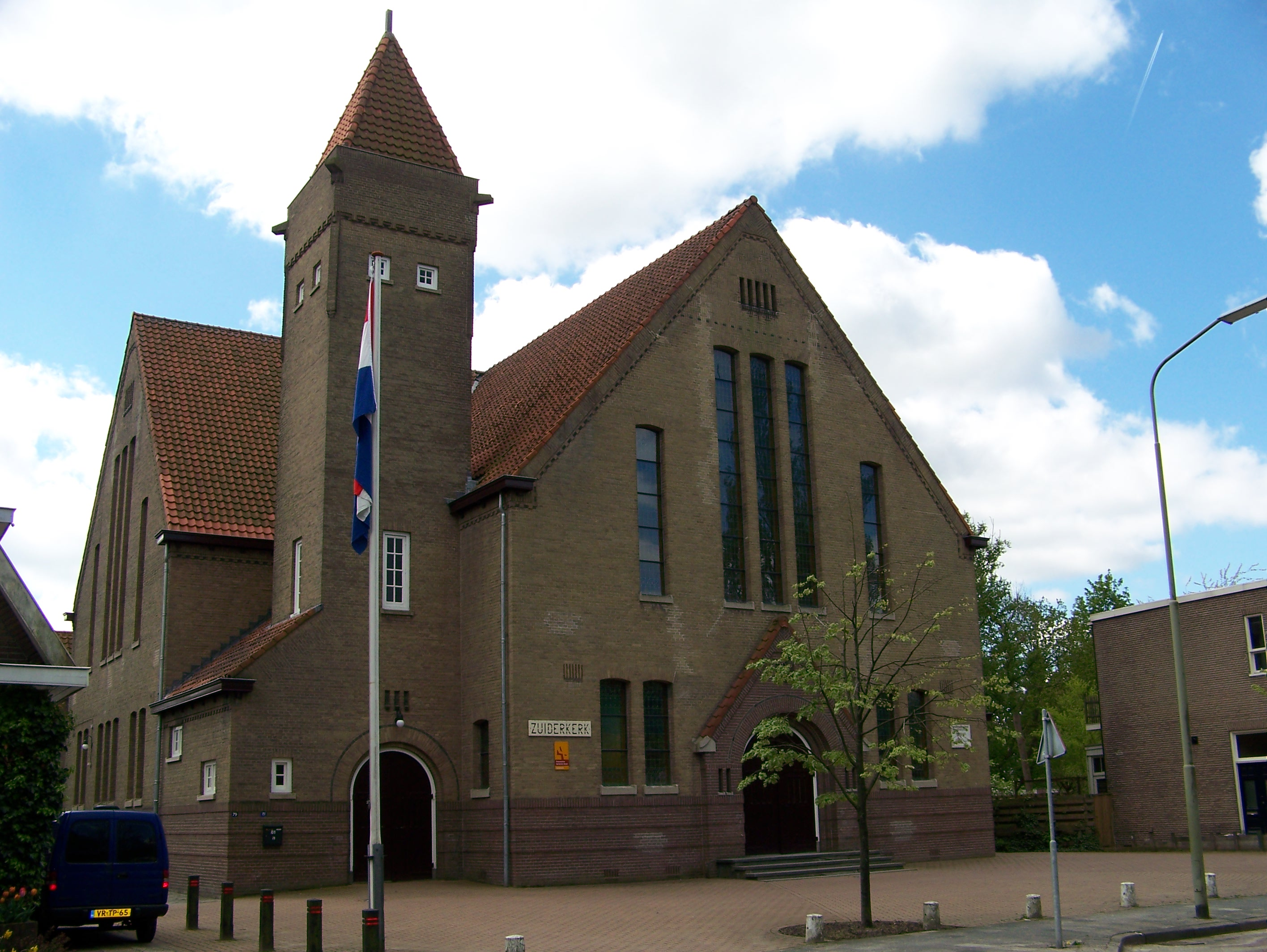 Zuiderkerk aan de Zuidersingel in Assen, is een Rijksmonument.